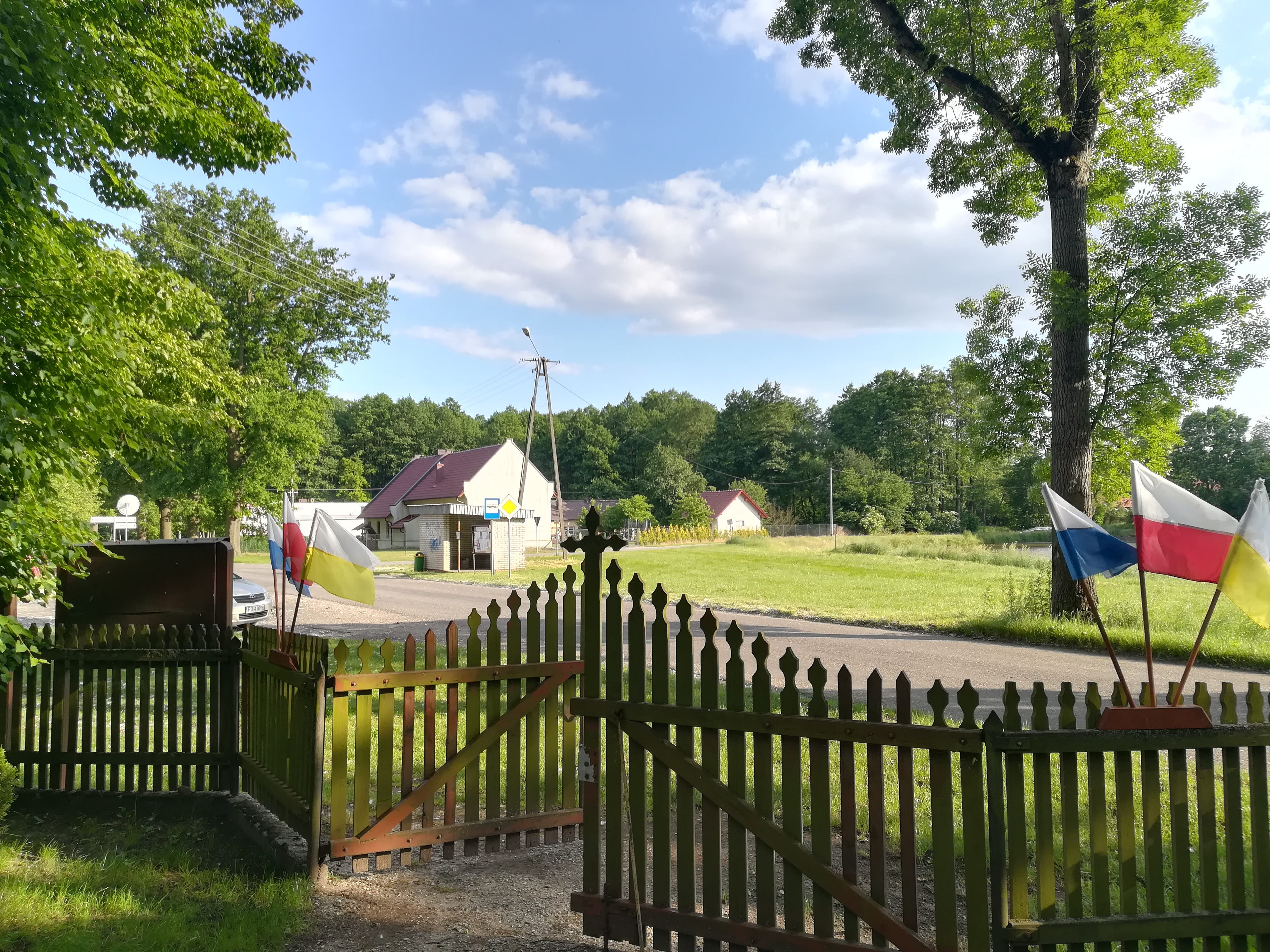 Dziesławice koło Milicza.